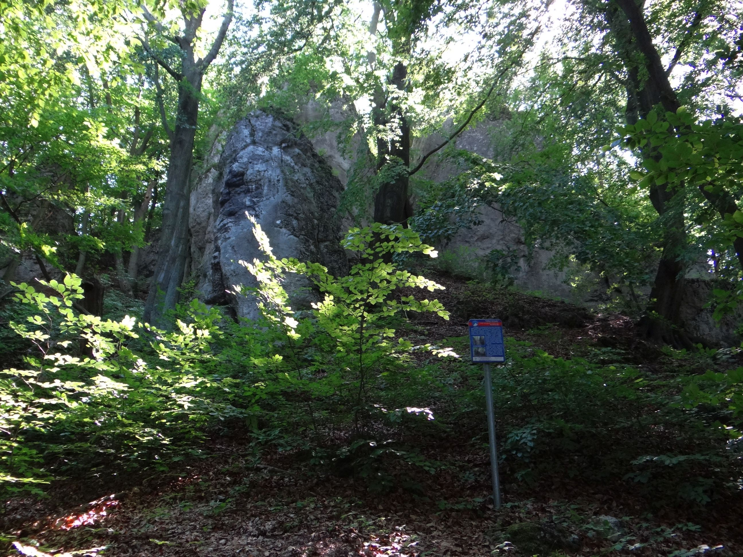 Kubińcowe Skały w Pierunkowym Dole w Nielepicach